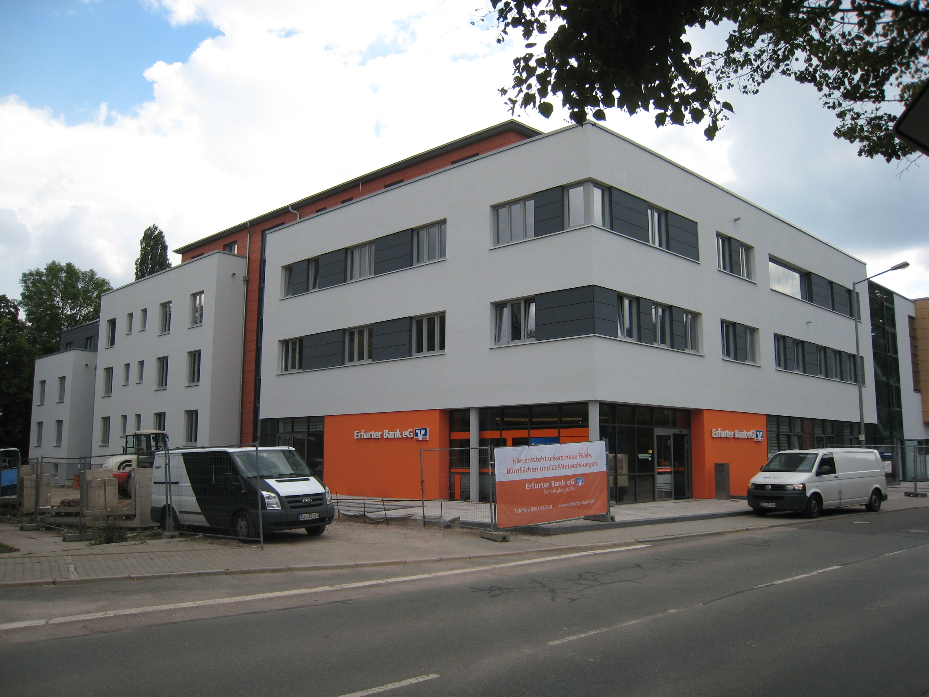 Haus Lindeneck in Arnstadt (Alexisweg 2), ehemaliges Wohnhaus von Willibald Alexis.